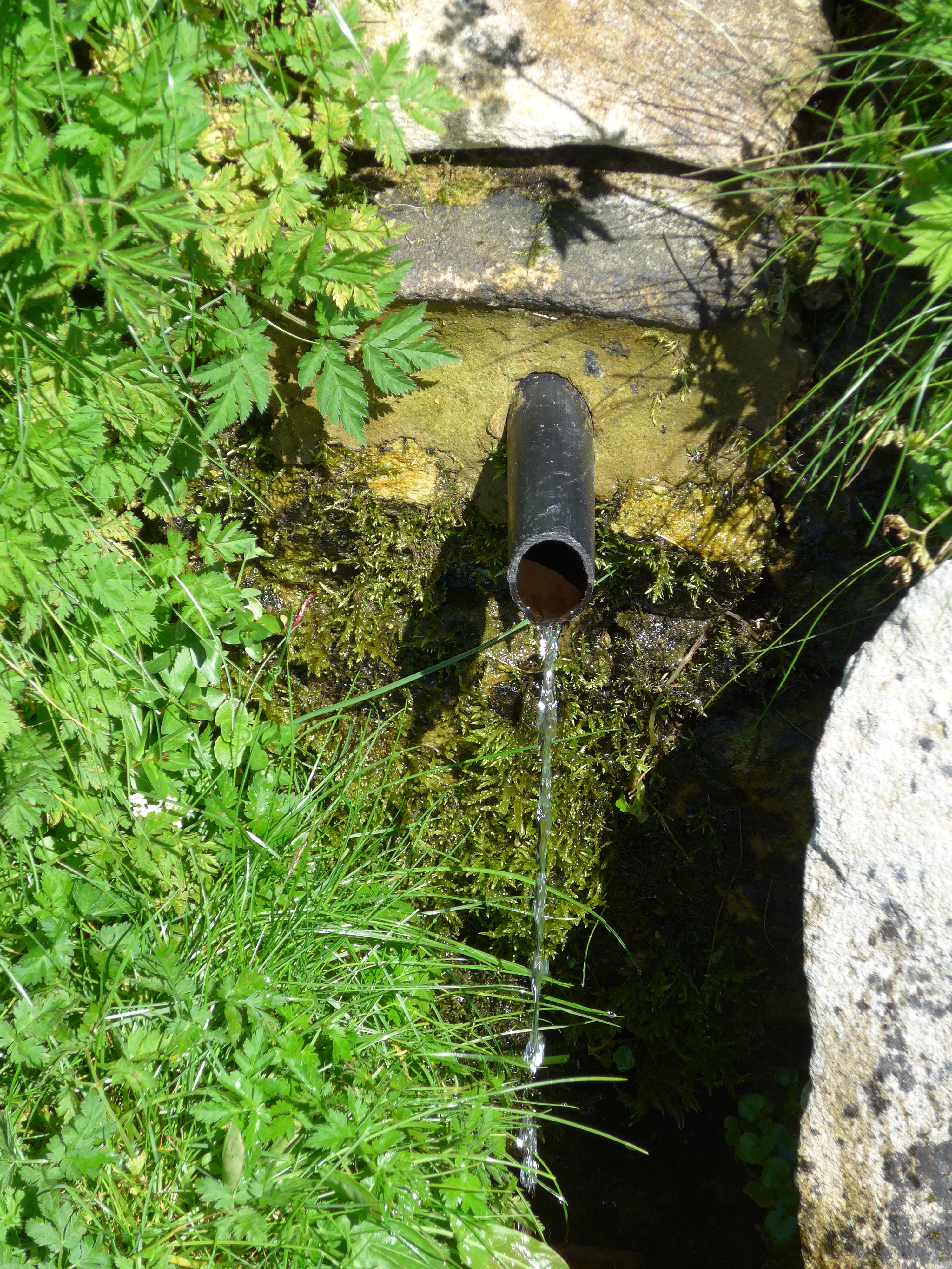 El collado-mirador de la Fuente del Chivo (1992 m) se llama así por estar localizado muy cerca de la Fuente del Chivo, un manantial de agua potable y gélida entre las sierras del Cordel y del Híjar (Cantabria).